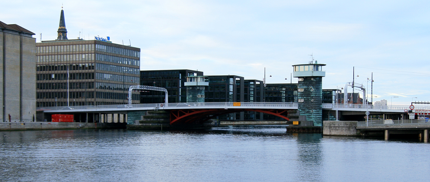 Knippelsbro, København.